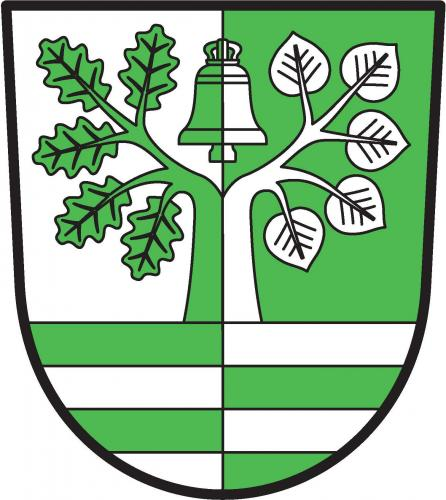 Kobylice, znak obce